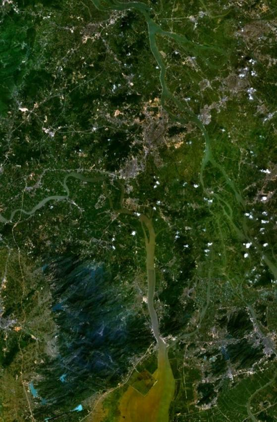 新会卫星图